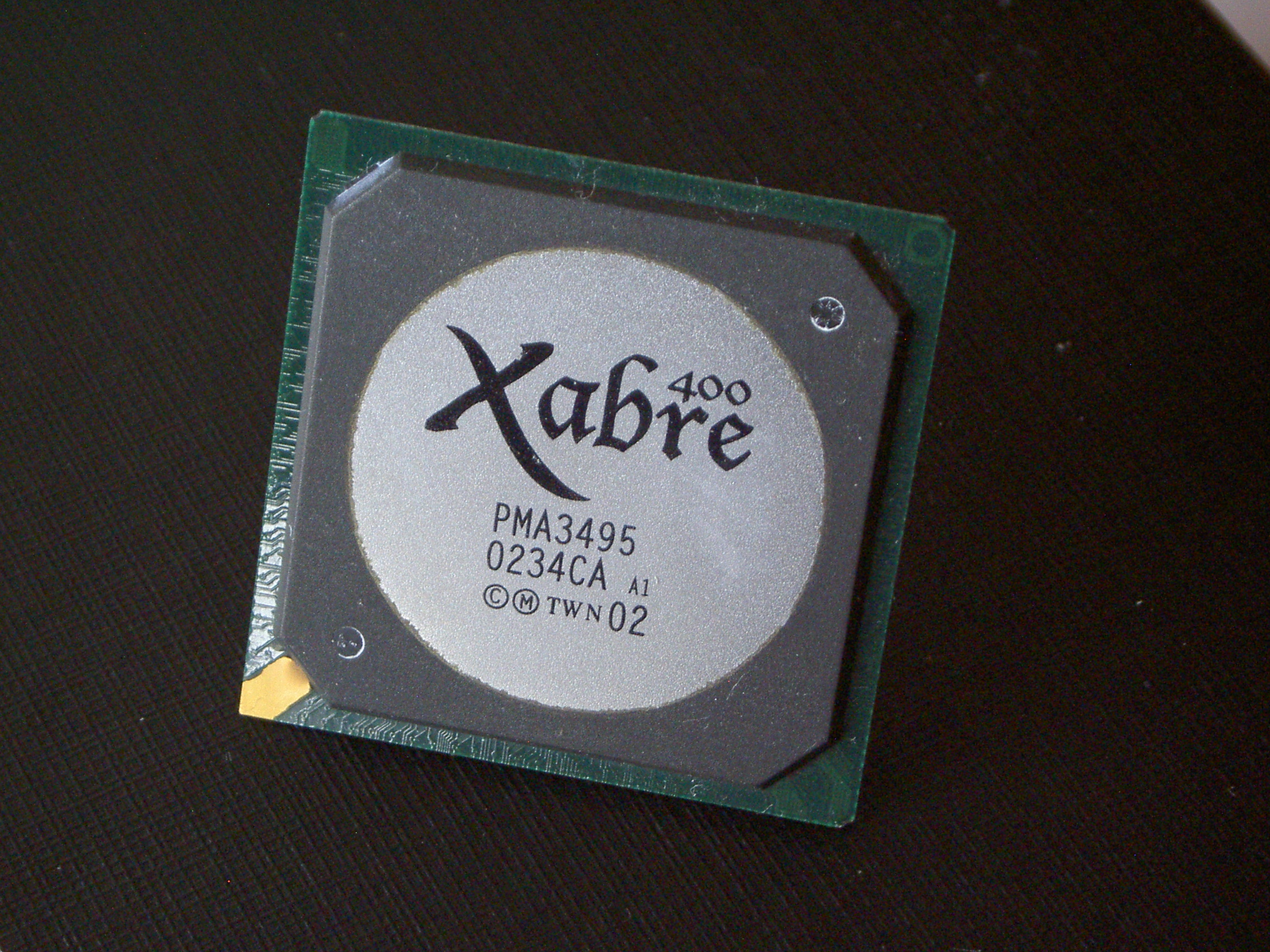 "SiS Xabre400 GPU"